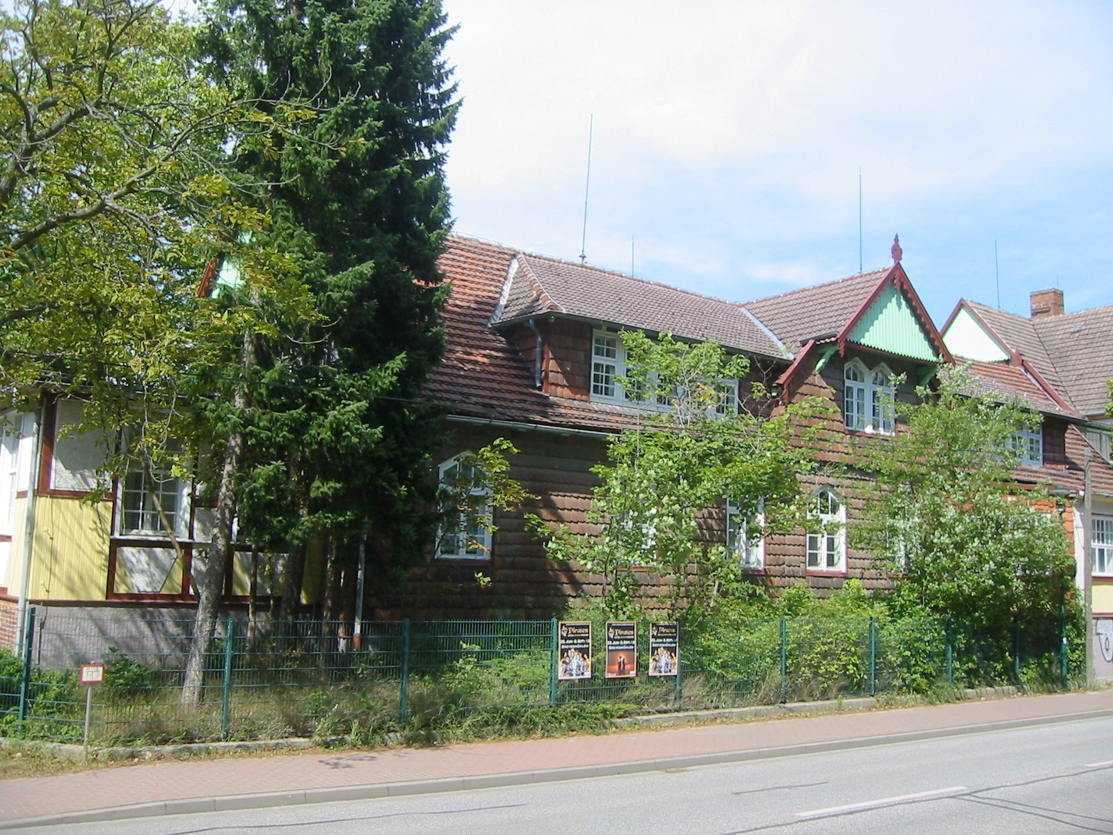 Denkmalgeschütztes Gebäude des ehemaligen Kindersanatoriums, die von Dr. Mettenheimer gegründet wurde - heute Kinderklink "Am Tannenhof" an der Ribnitzer Straße in Graal-Müritz.